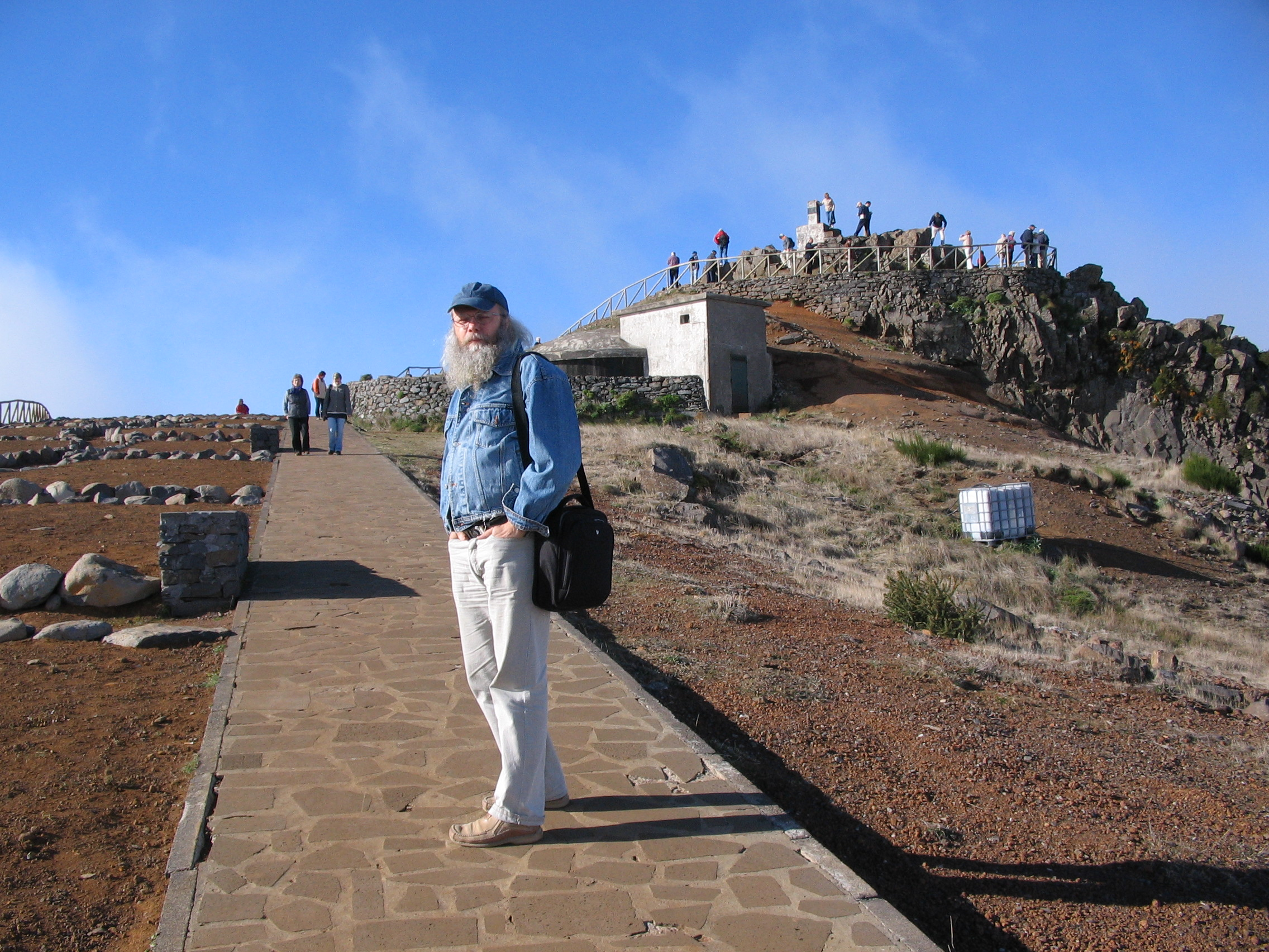 A Pico do Arieiro csúcs (1818 m) kilátópontja (Madeira)